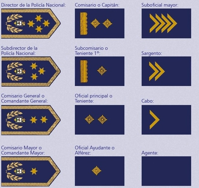 Nuevos Grados Policiales y Smbolos